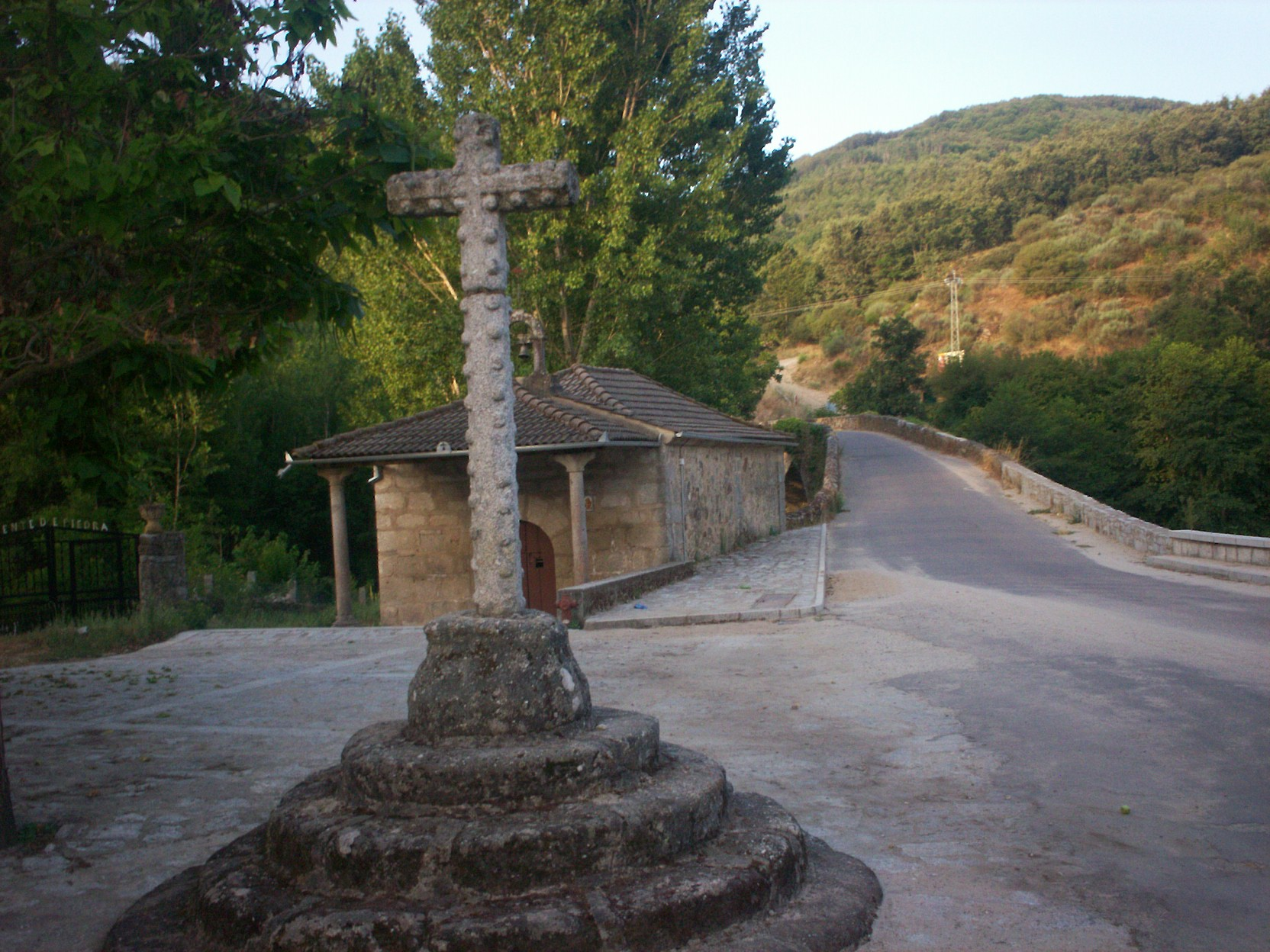 Esta ye una semeya bien completina, ta'l ponte, l'ermita, la cruz y embaxu'l ríu